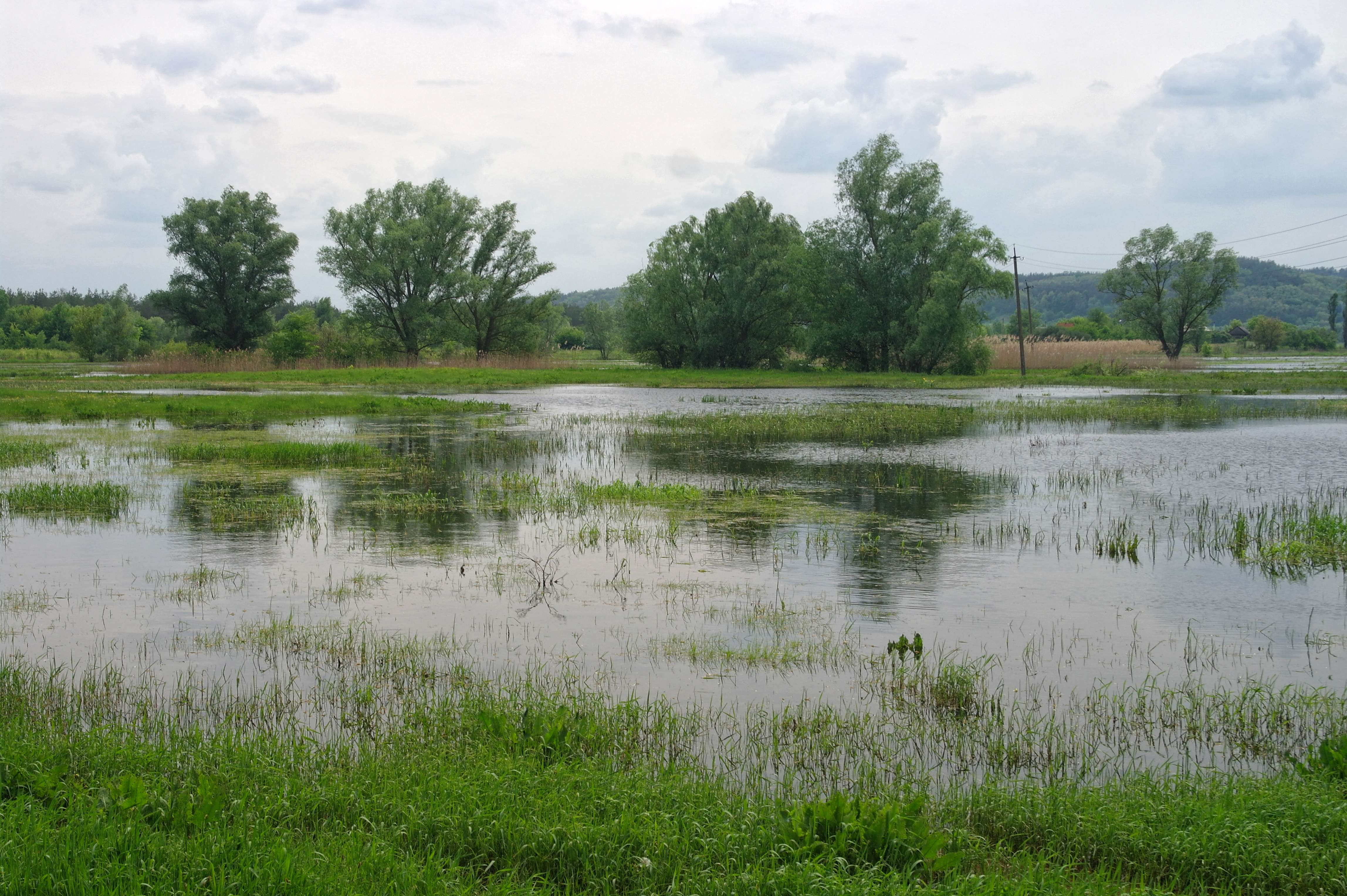 розливи Росі у Межиричі